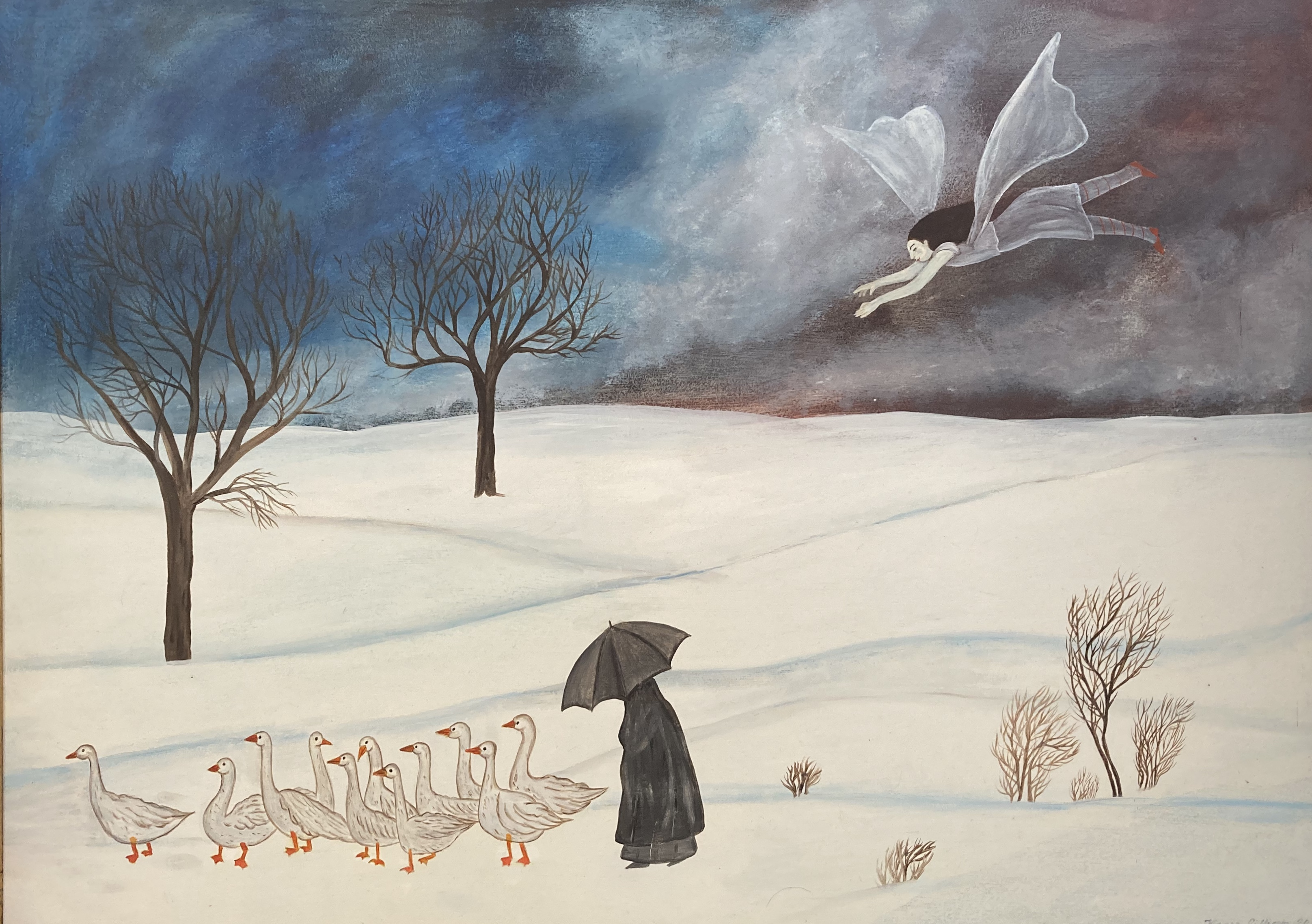 Winterlandschaft 2020